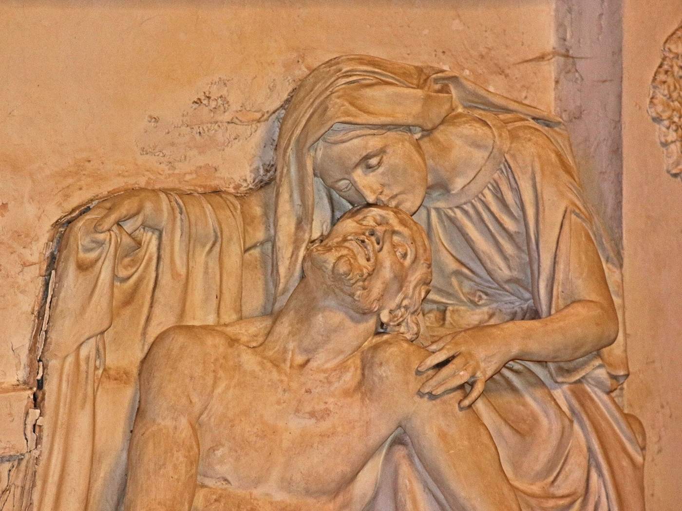 Beweinung Christi, Denkmal für die Plauer Gefallenen des Ersten Weltkriegs in der Plauer Marienkirche